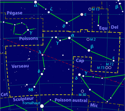 Carte pour la constellation du Verseau produite à l'aide du logiciel PP3